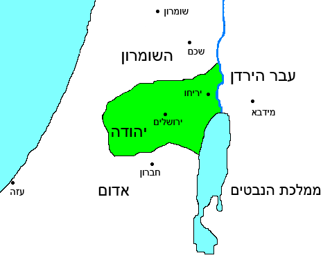 Categorie:Kaart Categorie:Afbeelding oudheid (Original text : Judea onder Judas Maccabeüs)